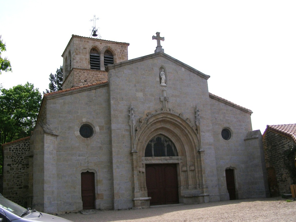 Église Saint-Cyr de Marcilly-le-Châtel, (Inscrit, 1991) .